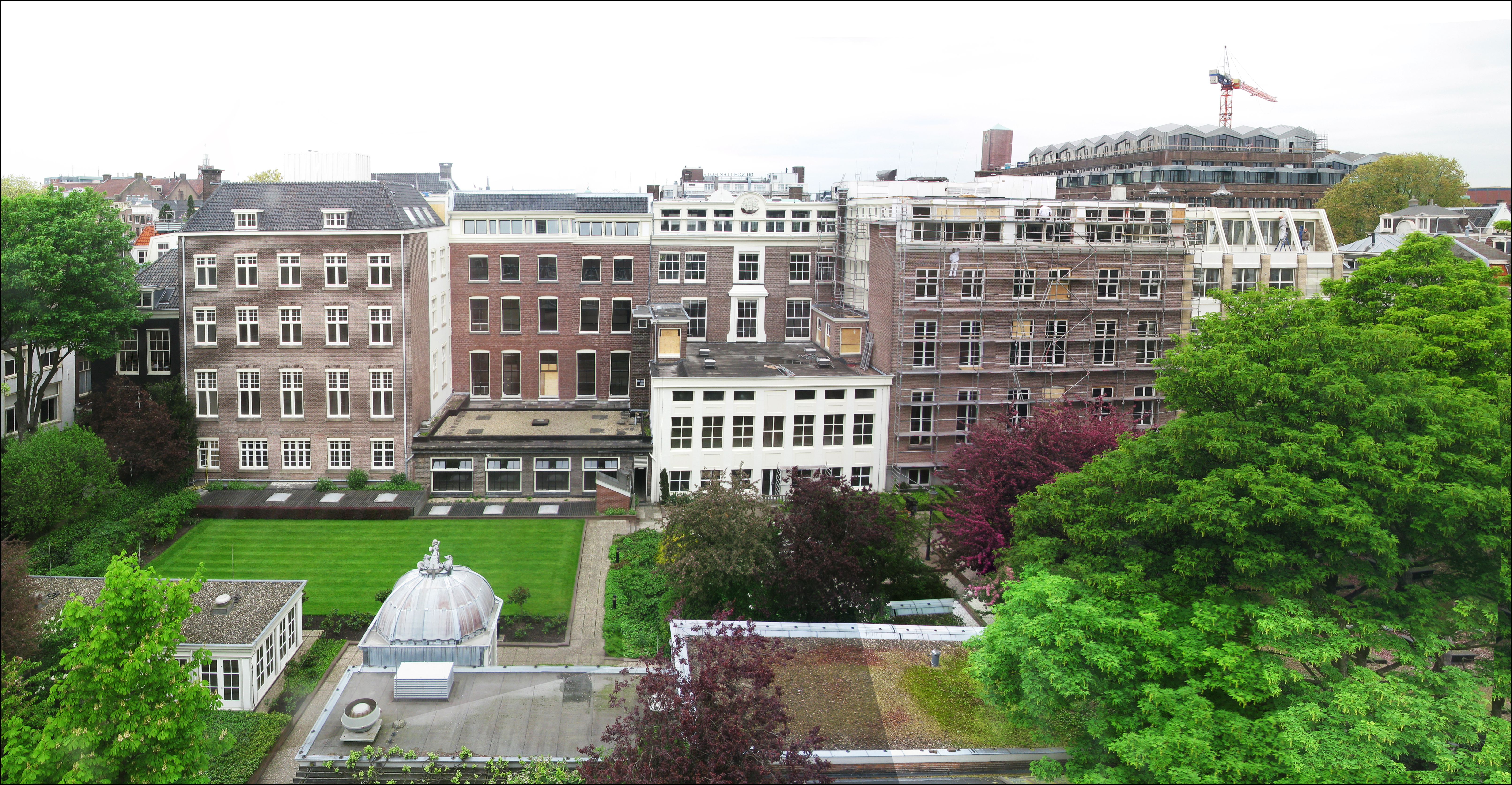 Herengracht 548 Adam rijksmonument nr. 1892